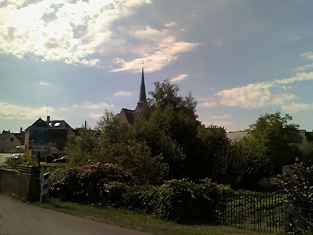 L'église Saint-Laurent de Challes vue de l'autre rive du Narais.